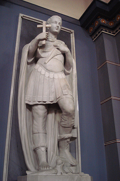 Interior da Igreja São José, Porto Alegre, Brasil. Estátua de Santo Expedito, de autoria de André Arjonas.